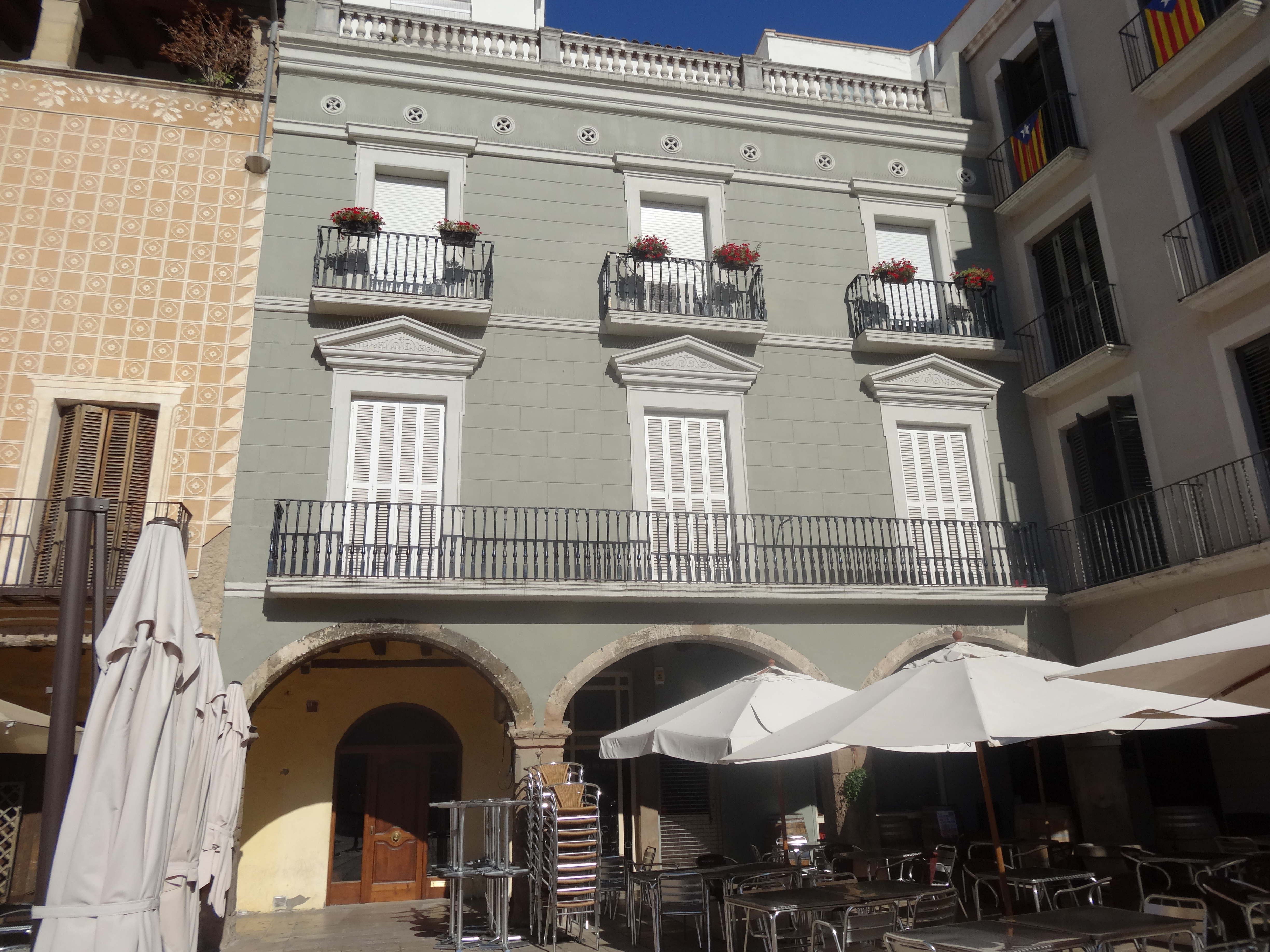 Edifici a la Plaça de l'Ajuntament, 10-11 (Igualada)